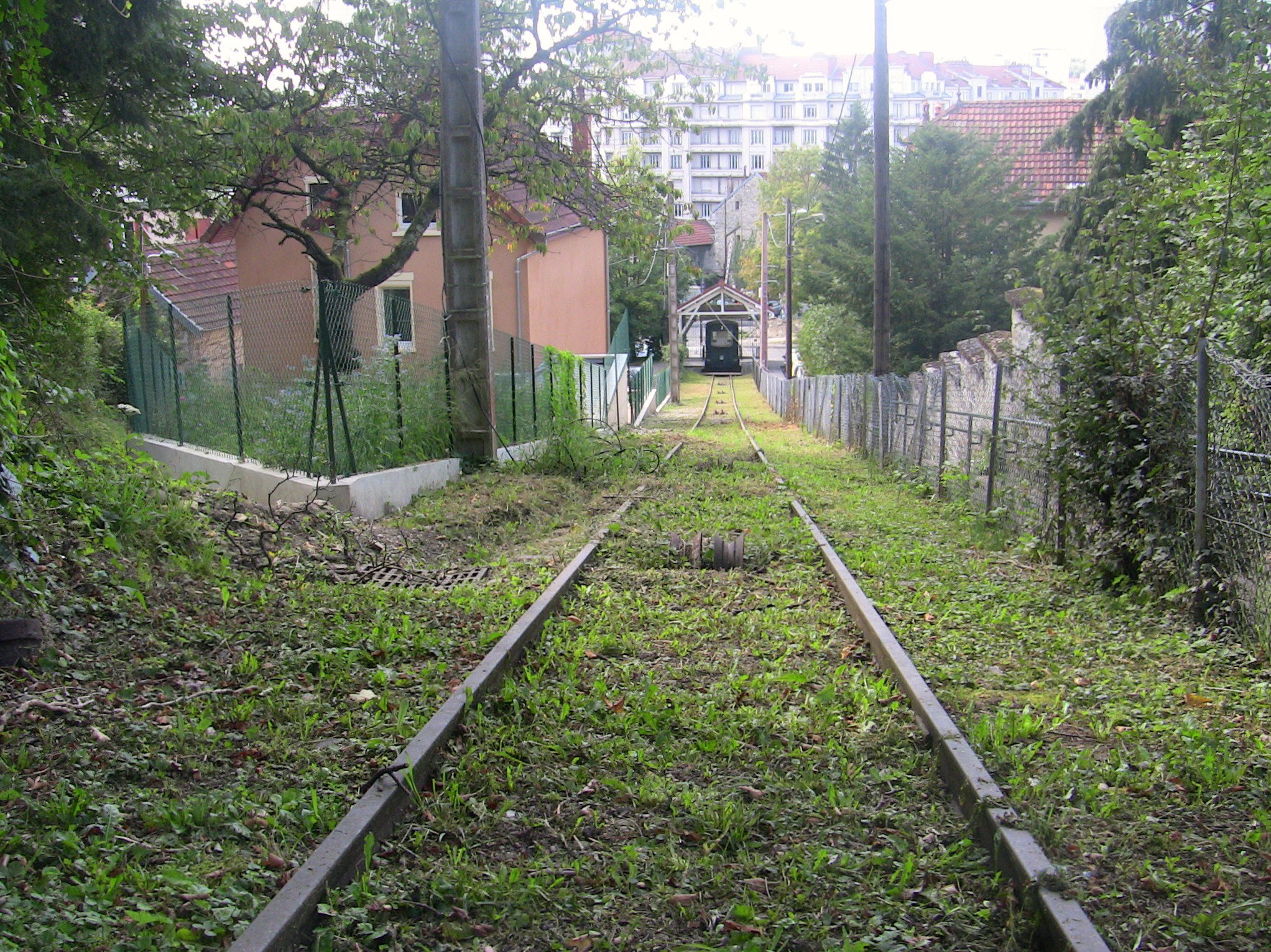 Voie du funiculaire de Bregille à Besançon (Doubs, France).